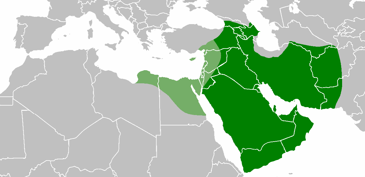 png file under GFDL license